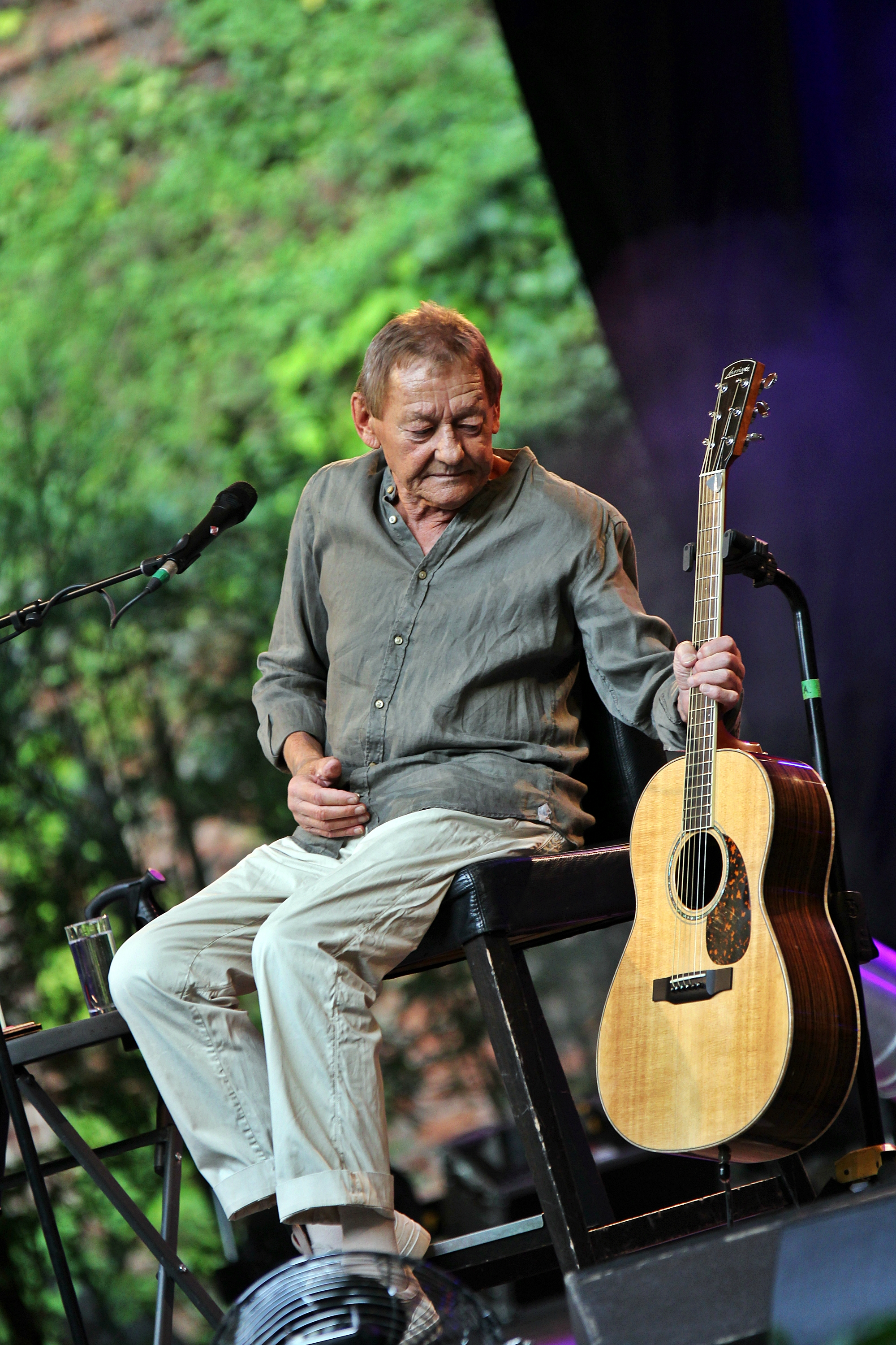 Wolfgang Ambros in Nürnberg 2019